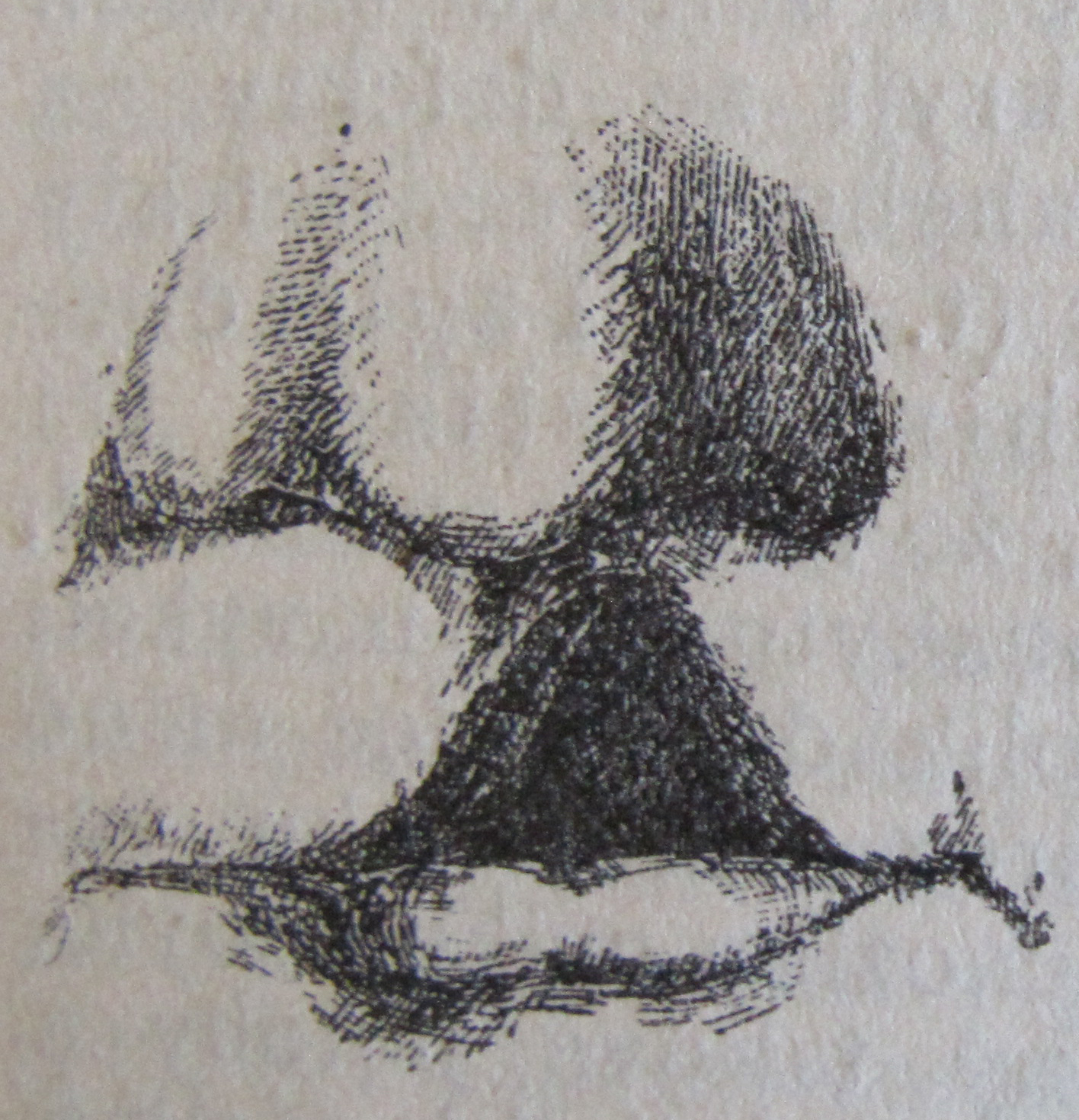 Původní popisek: Č. 3155. Rozštěp pysku.